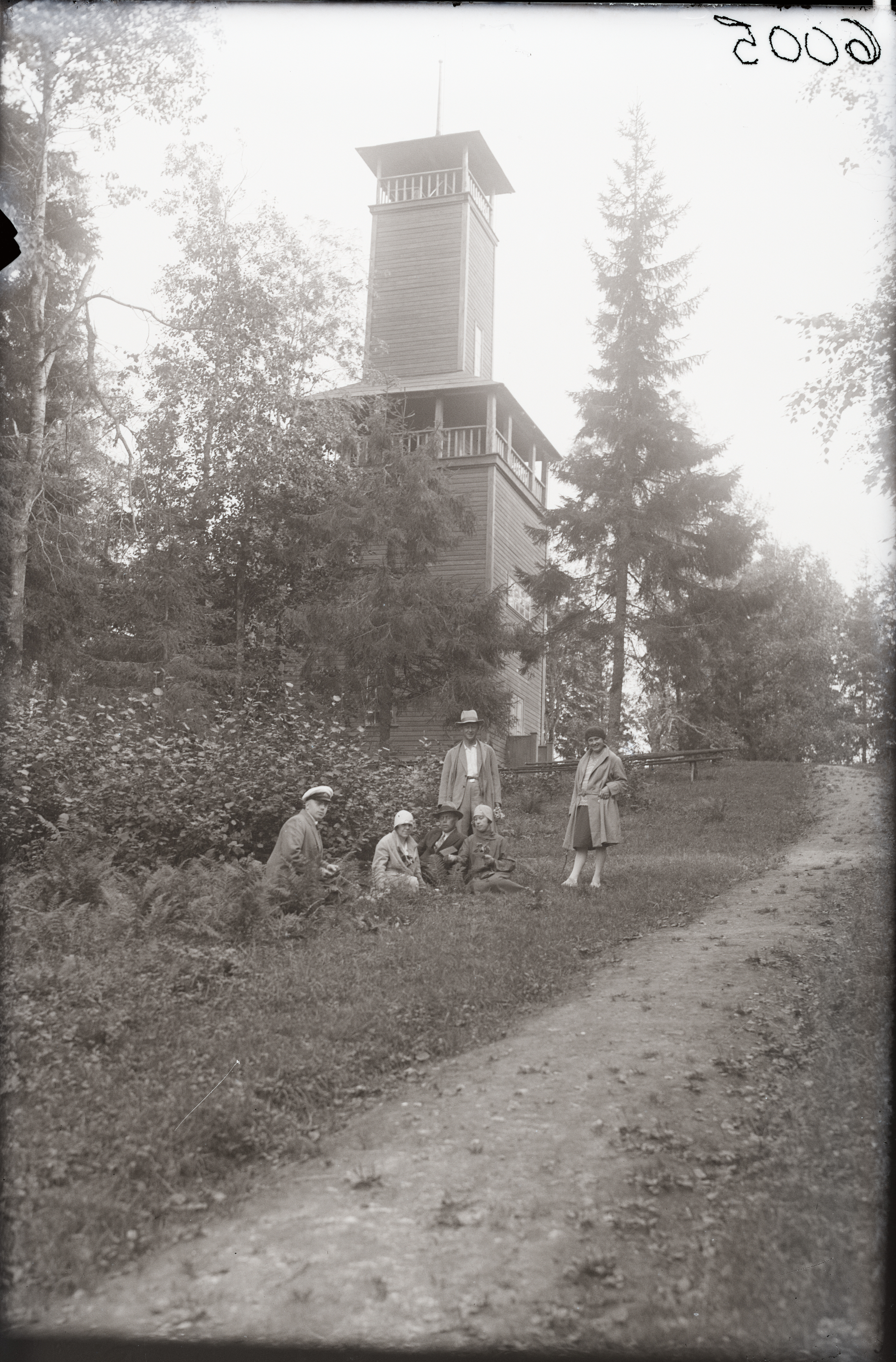 Suur Munamägi, vaatetorn